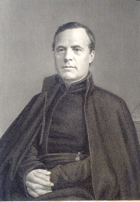 le père Célestin Félix, jésuite